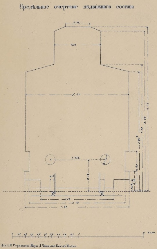 Передельные габариты железнодорожного подвижного состава